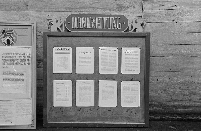 Original image description from the Deutsche Fotothek Wandzeitung der Wertpapierdruckerei Leipzig